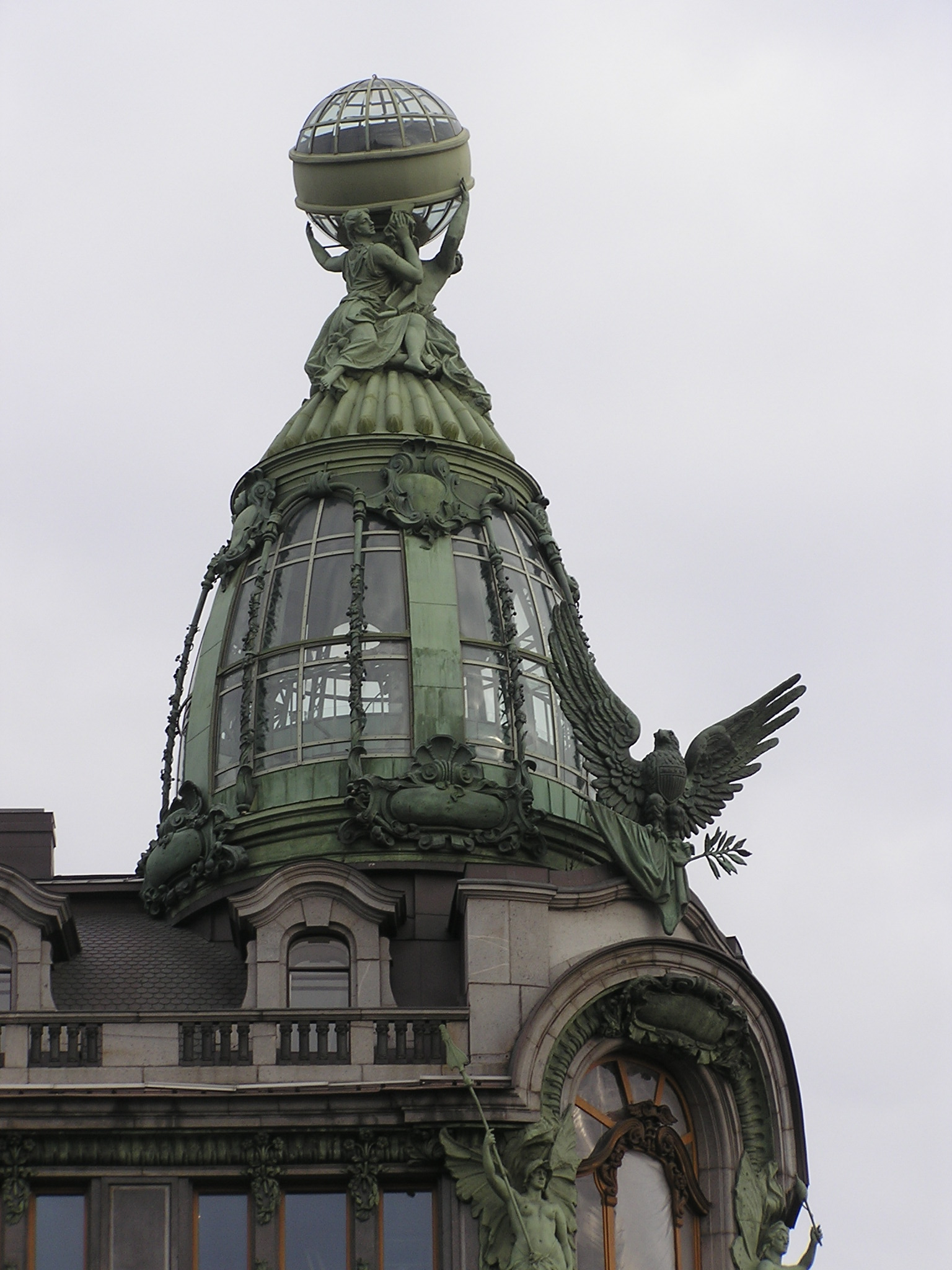 Санкт-Петербург. Невский проспект. Дом компании Зингер («Дом Книги»)